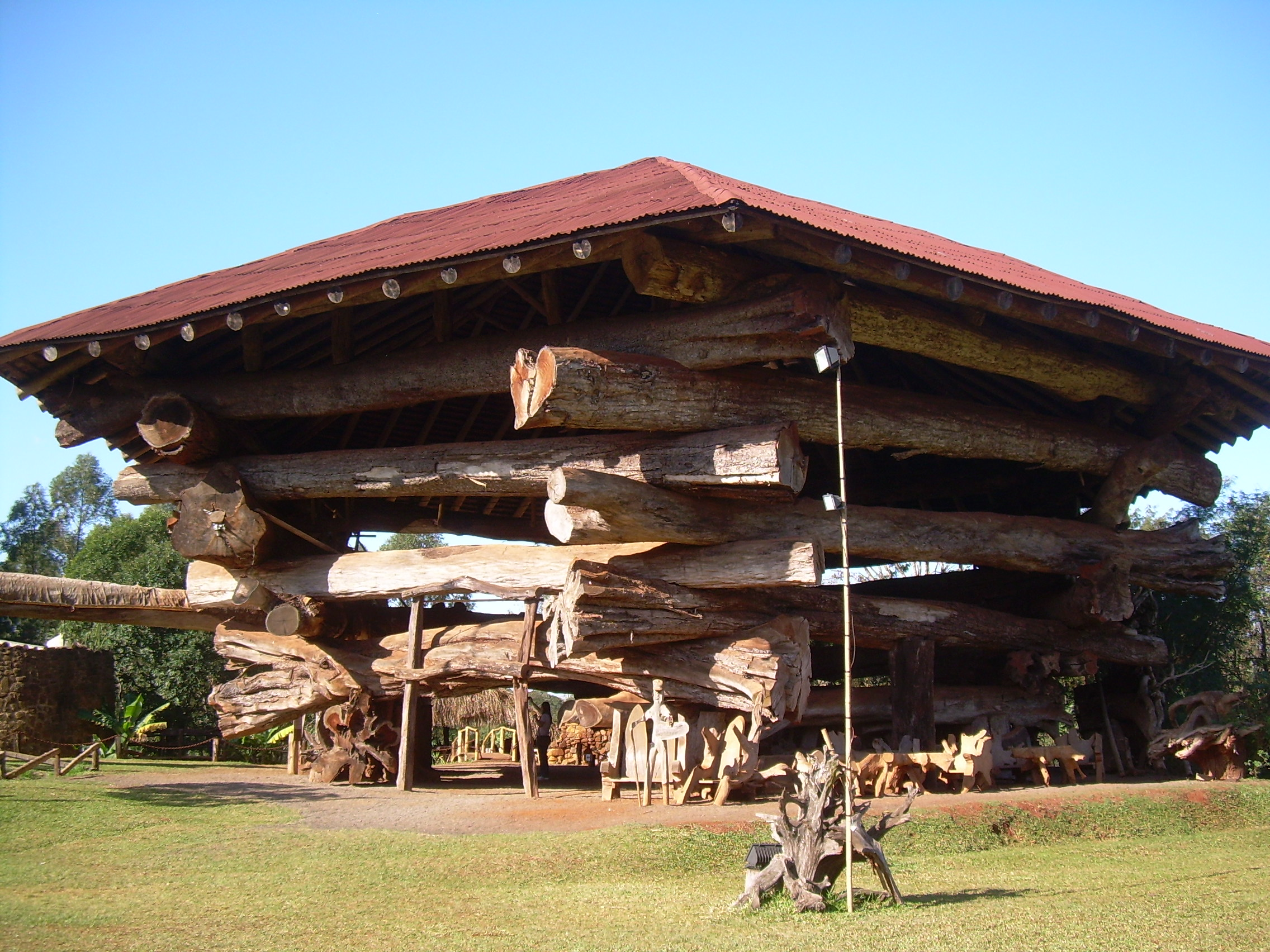 La aripuca, feita com enormes troncos nativos da região. Localizado em Puerto Iguazú, Missiones, Argentina